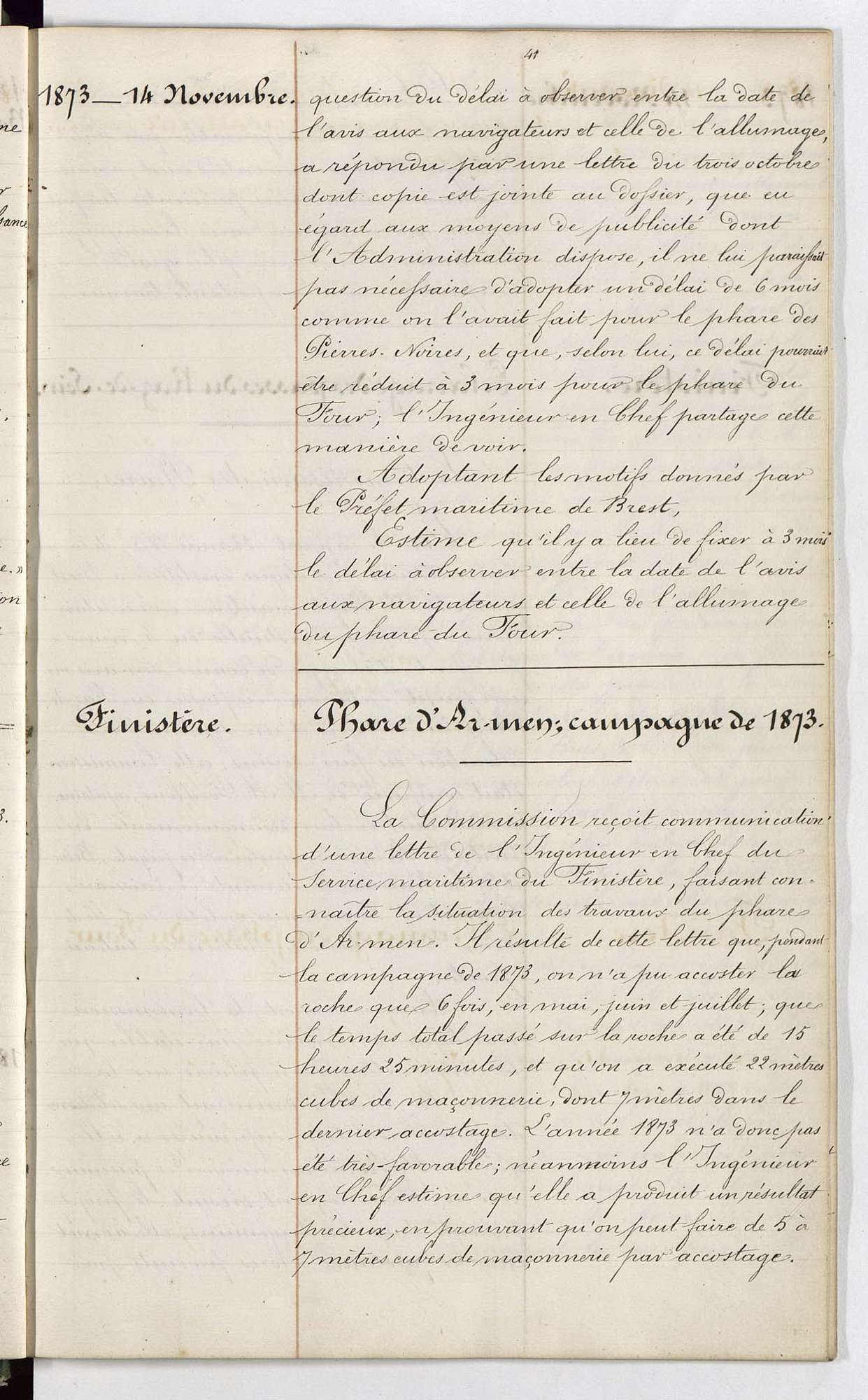 Commission des phares. Procès verbal de novembre 1873